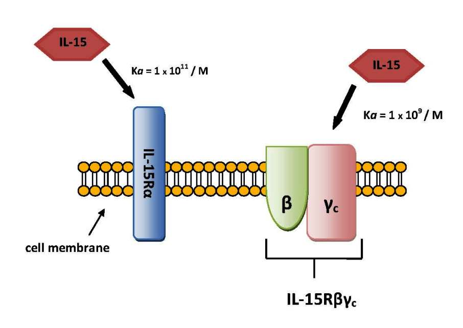 Afinita IL-15 na receptor